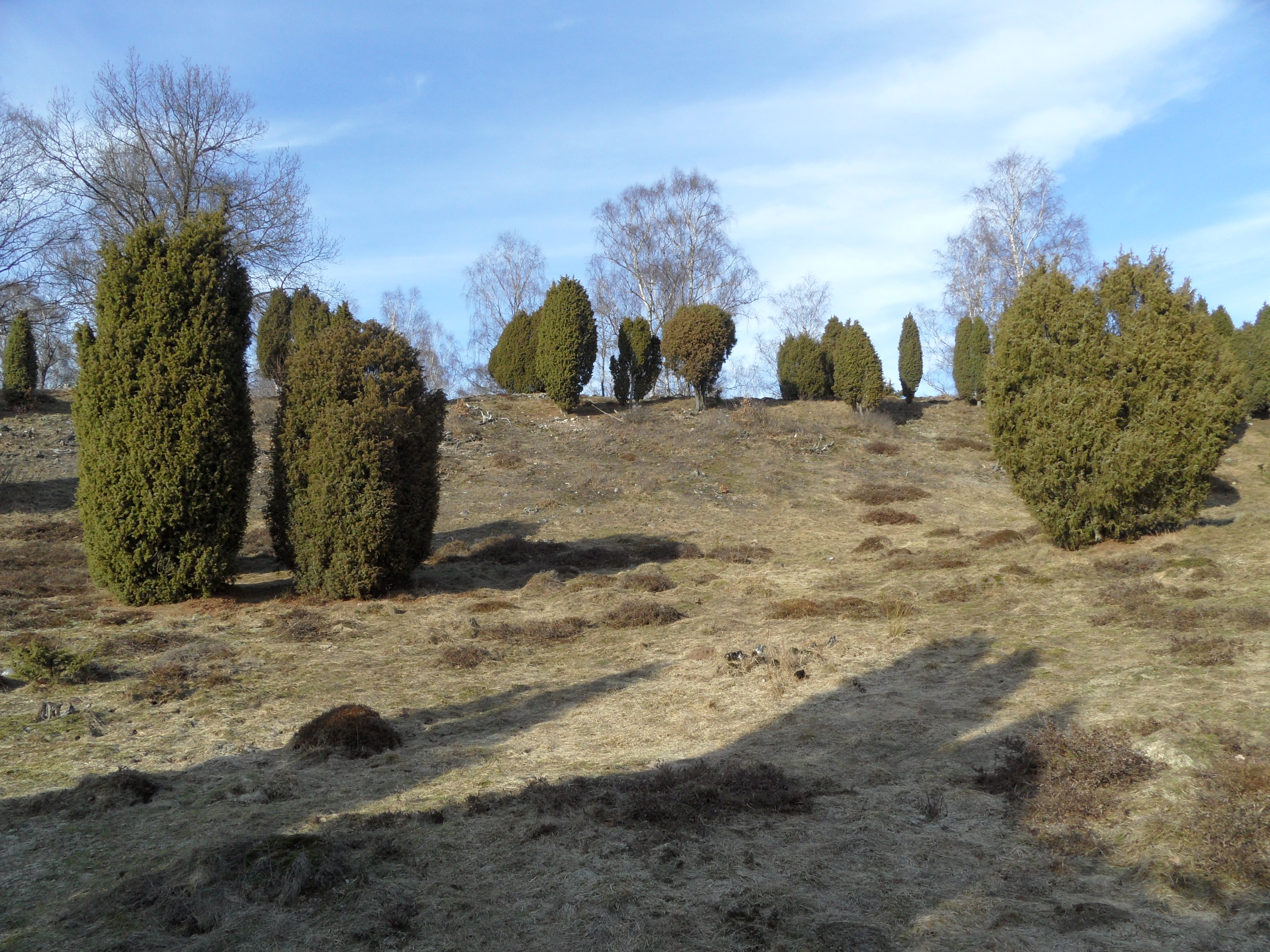 Enefälad solig vårvinterdag